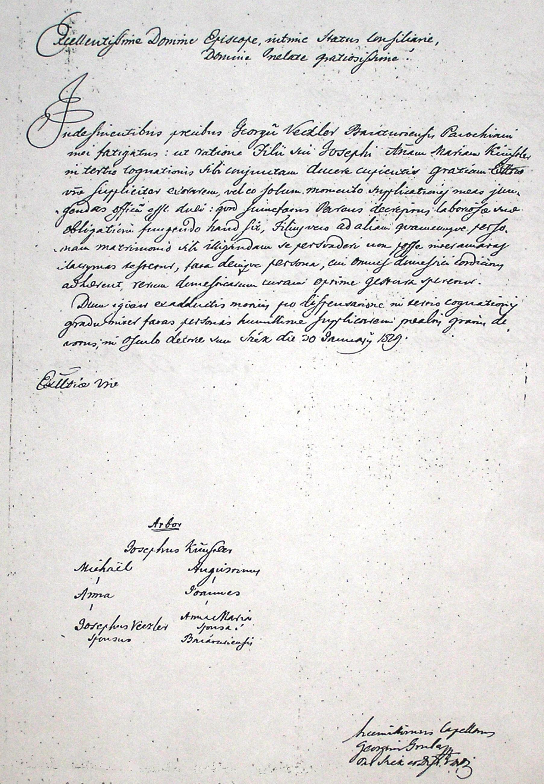 Házassági akadály alóli felmentés felterjesztése az Egyházmegyei Hatóságnak 1829-ből. A kérelemhez mellékelt családfa miatt a dokumentum illusztráció lesz a Wikipédia Családfakutatás szócikkéhez.